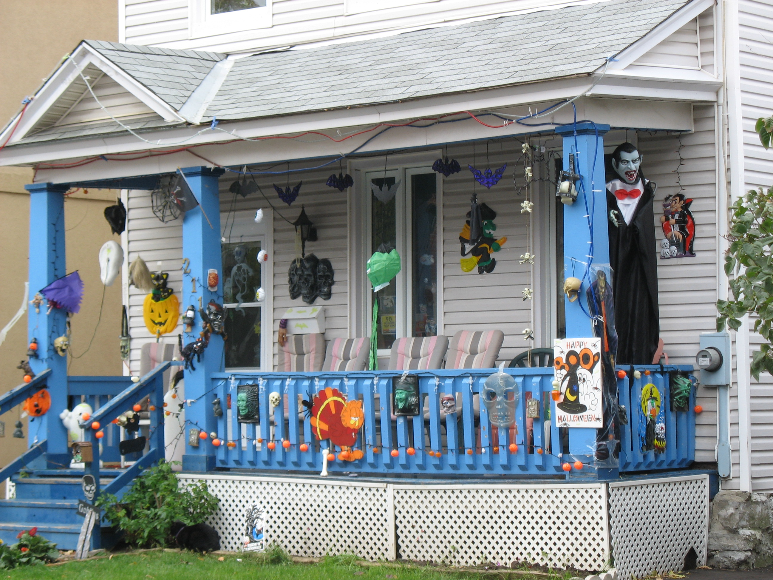 Дом, украшенный на Хеллоуин. Октябрь 2011, Оттава, Сенди-Хилл.